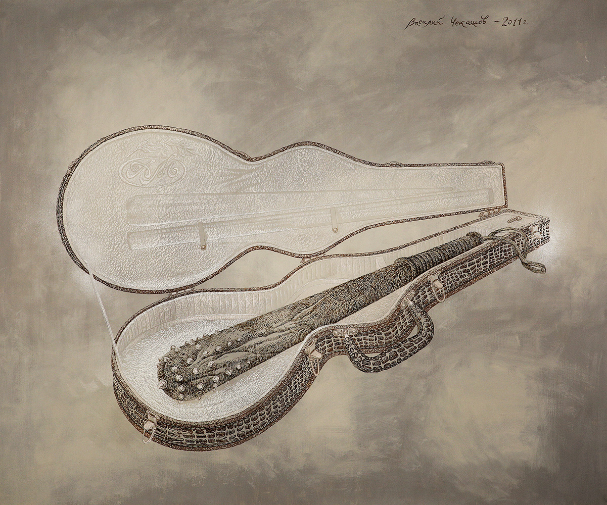 ВЕНДЕТТА. Холст, масло. 120Х100 см. 2011 г